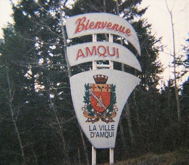 Amqui, Quebec (November 2001)